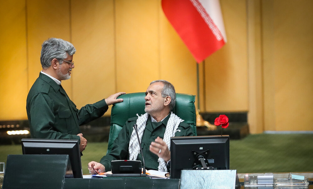 حضور نمایندگان مجلس شورای اسلامی ایران با یونیفرم سپاه پاسداران انقلاب اسلامی در جلسهٔ علنی ۲۰ فروردین ۱۳۹۸، به مناسبت روز پاسدار و در محکومیت اقدام دولت ایالات متحدهٔ آمریکا به قرار دادن سپاه پاسداران در فهرست گروه‌های تروریستی